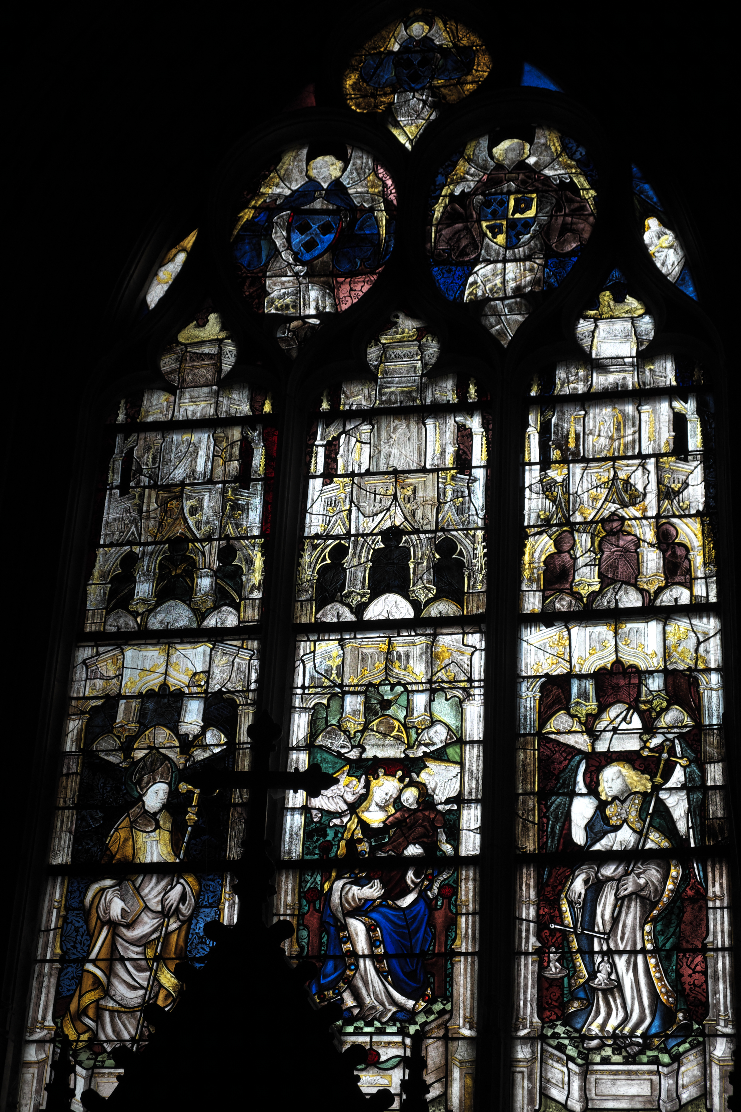 Katholische Pfarrkirche Notre-Dame-des-Marais in La Ferté-Bernard im Département Sarthe (Pays de la Loire/Frankreich), Bleiglasfenster mit Fragmenten aus dem 15./16. Jahrhundert, 1931 restauriert und ergänzt; Darstellung: Bischof (links), Madonna mit Kind (Mitte), Erzengel Michael (rechts)